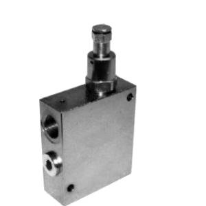 Differentialventil